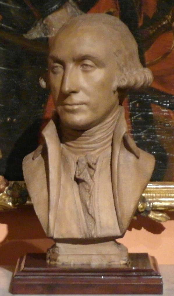 Busto de Federico Gravina y Nápoli en terracota, realizado por Cayetano Merchi en 1799 y conservado en el Museo Naval de Madrid, (España).